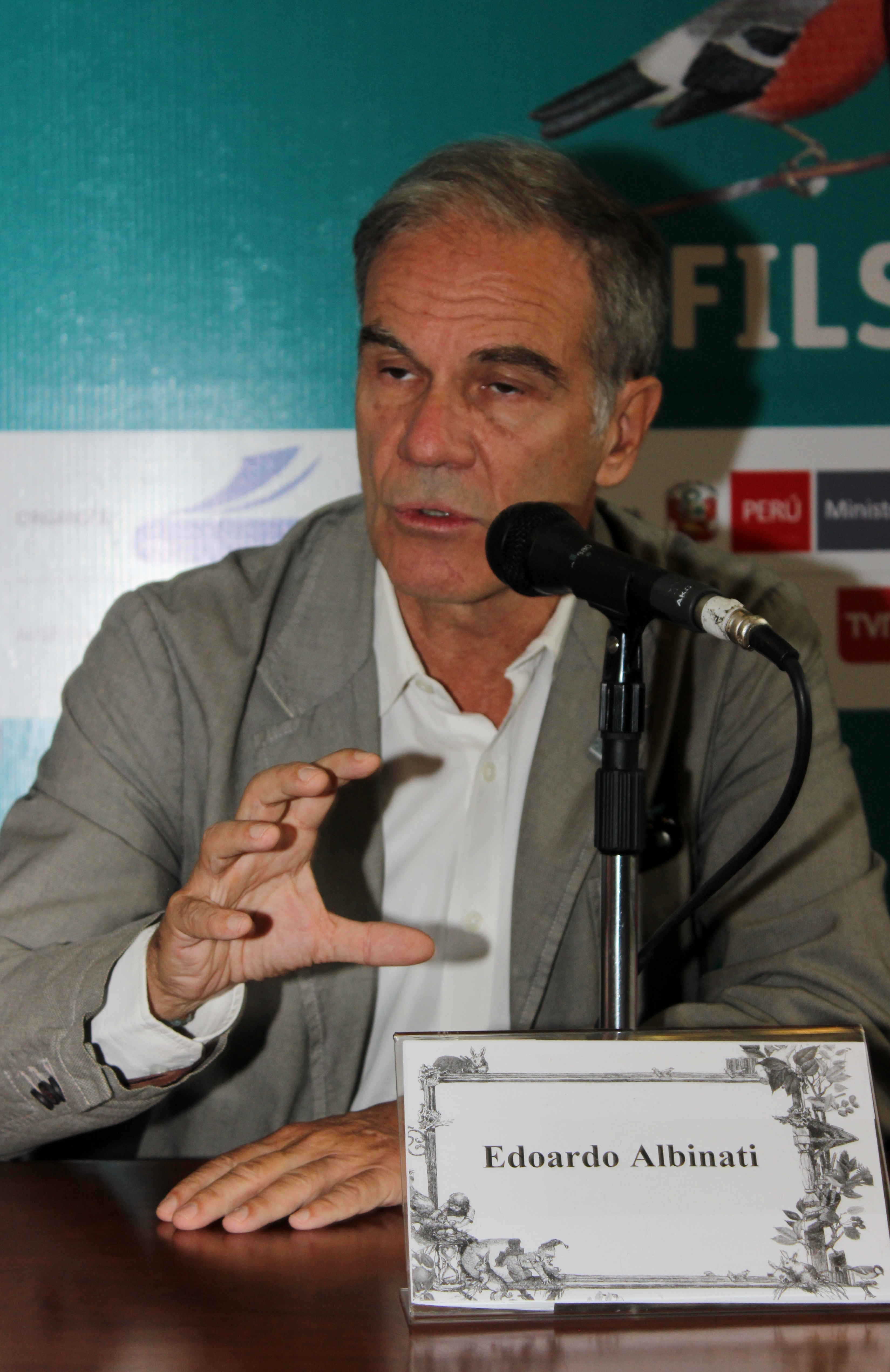 El escritor italiano Edoardo Albinati en la Feria Internacional del Libro de Santiago 2018.